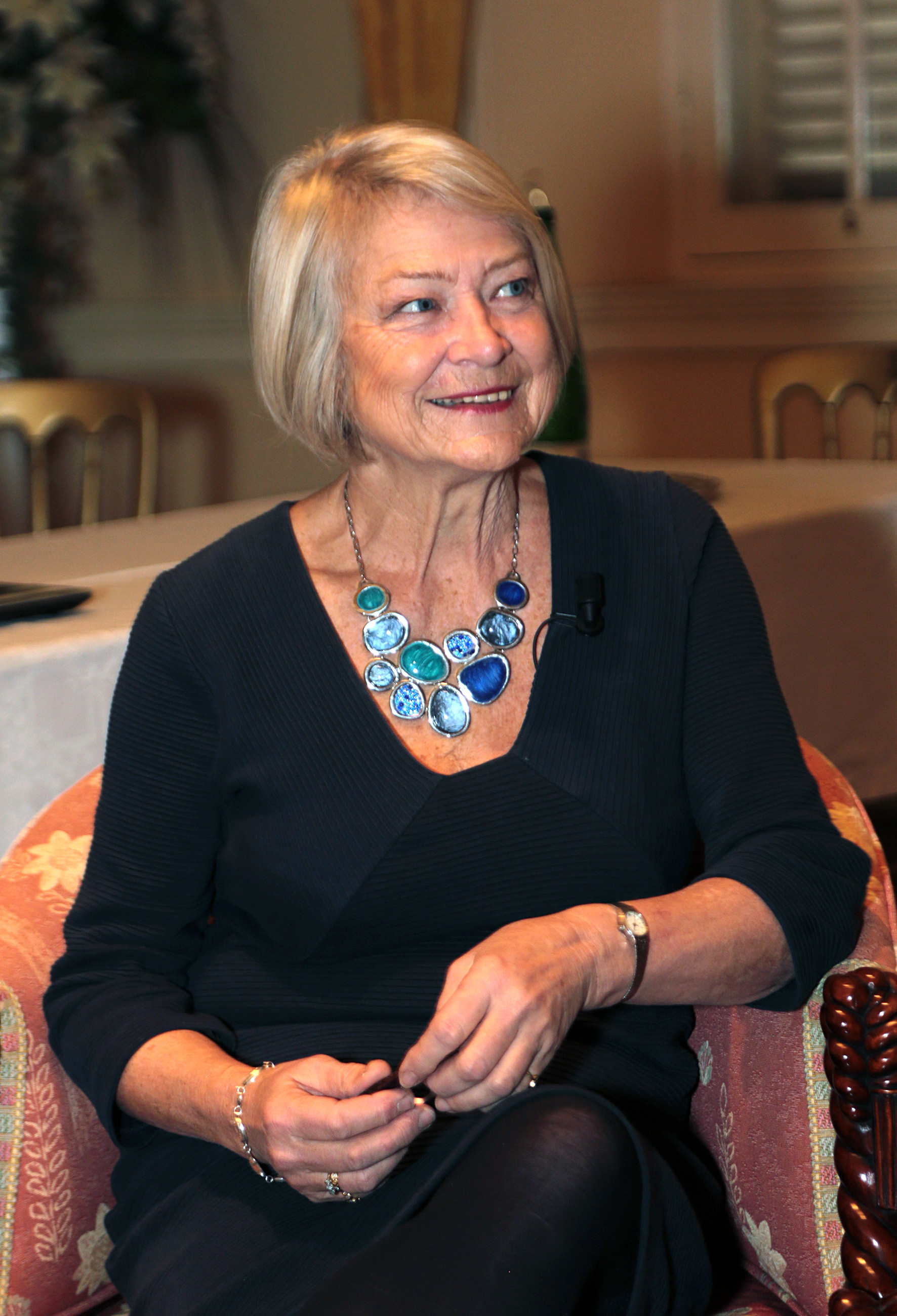 Kate Adie, Festival Internacional de Literatura Gibunco de Gibraltar